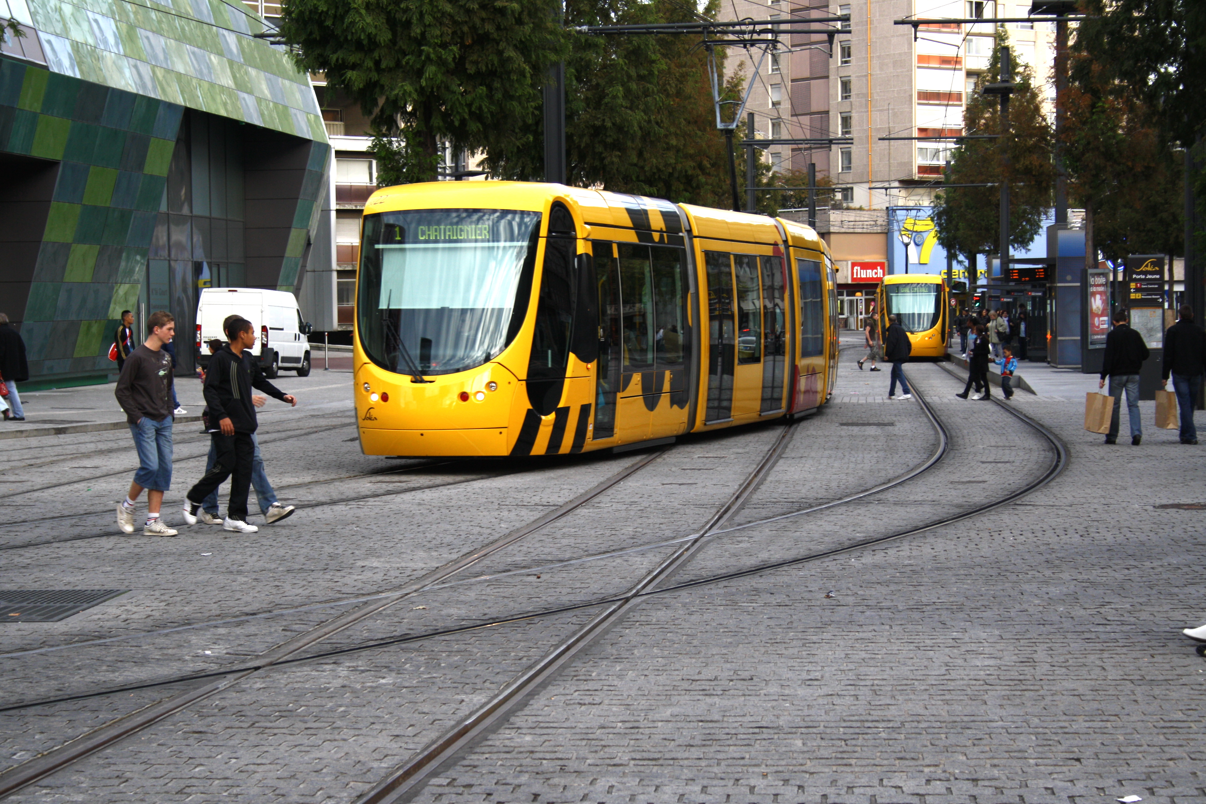 Straßenbahnwagen an der Porte Jeune in Mulhouse